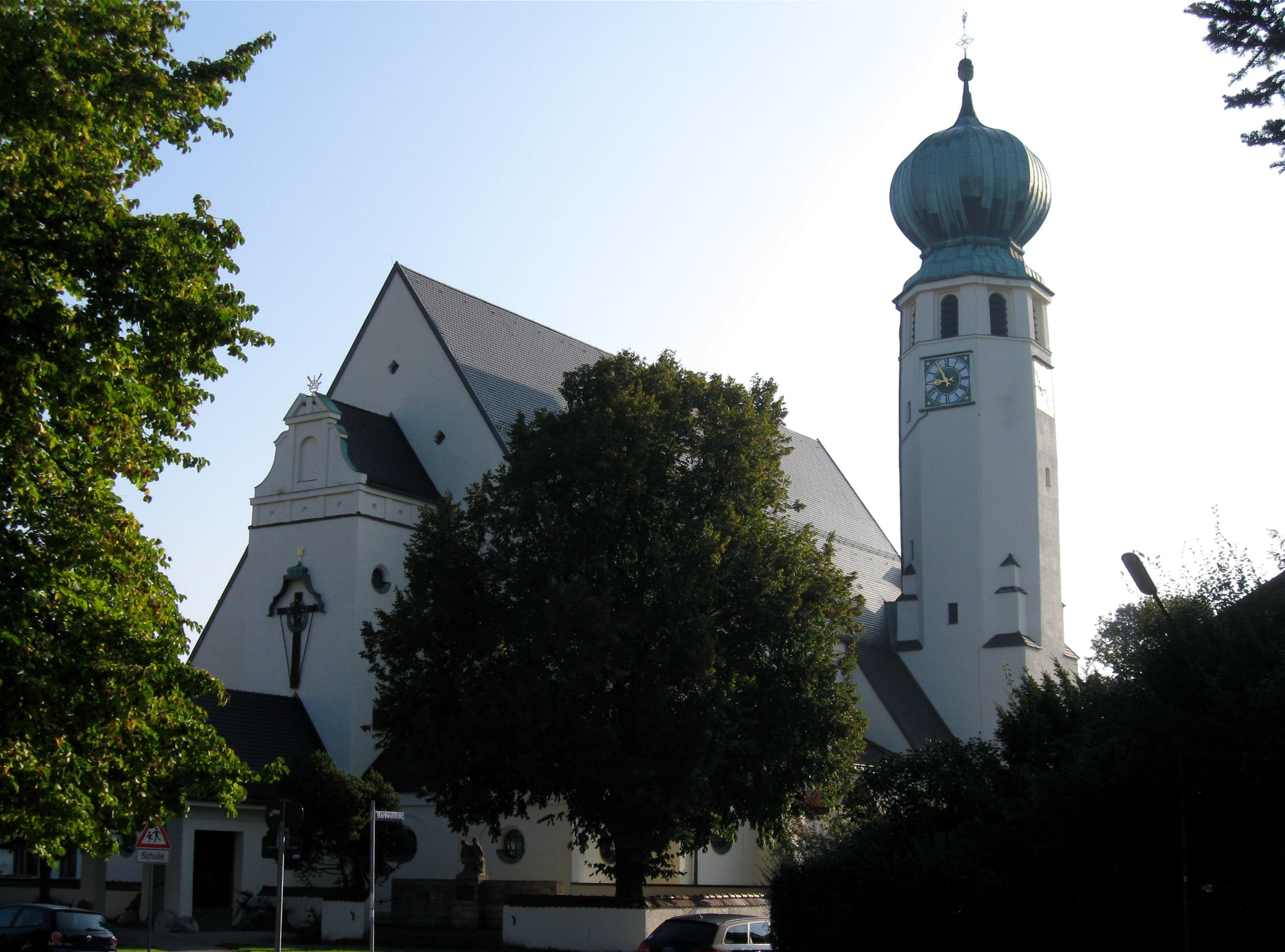 Canisiusplatz 1; Kath. Pfarrkirche St. Canisius, barockisierend, 1925-26 von Franz Rank.